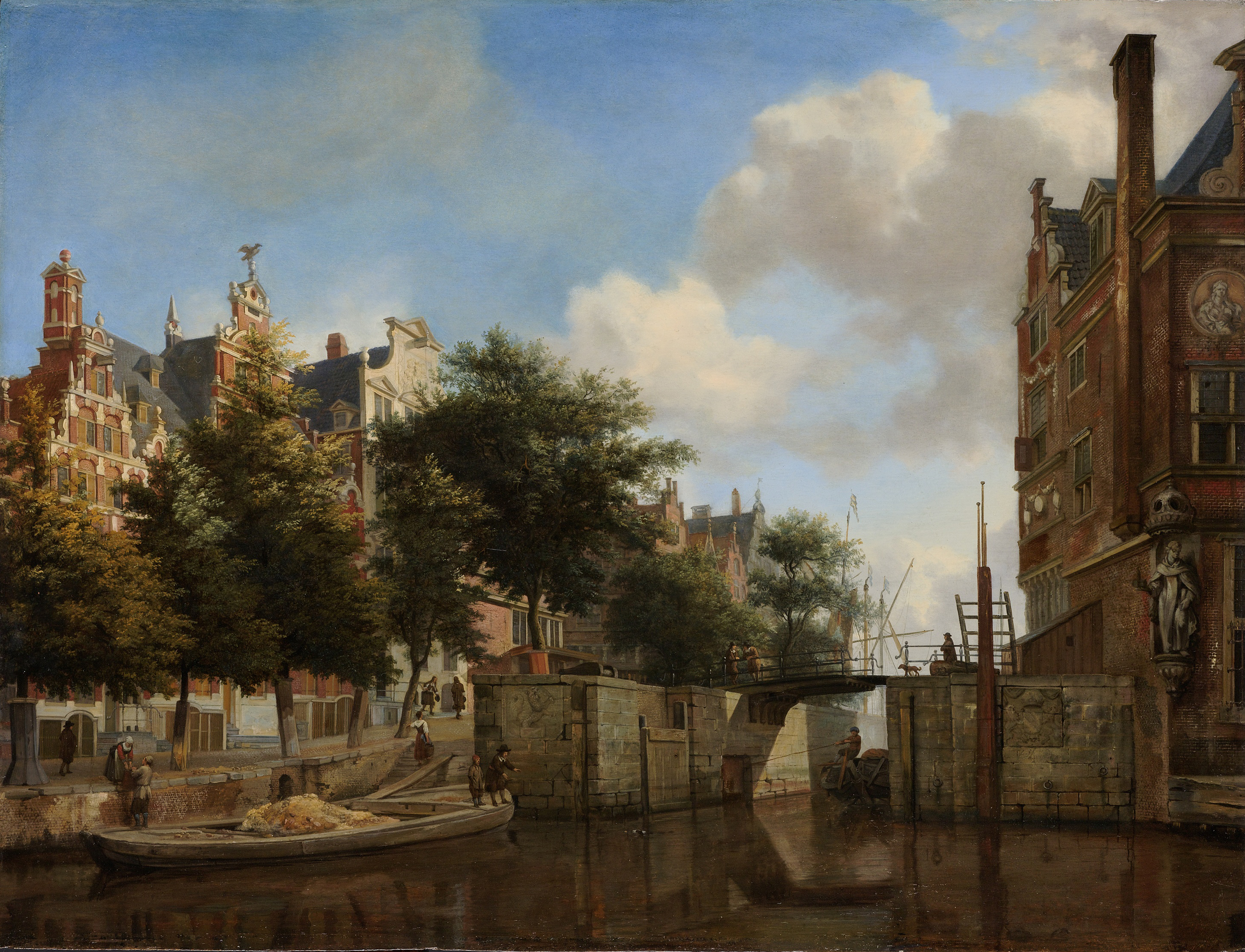 Gezicht op de Nieuwe Zijds Voorburgwal met de Oude Haarlemmersluis te Amsterdam. Links aan de gracht het huis Bartolotti, rechts een heiligenbeeld op de hoek boven het water. In het midden een ijzeren brug waarvan de pijlers zijn versierd met heraldische wapens met leeuwen. Op het water twee schuiten.; Jan van der Heyden (1637–1712), olieverf op paneel, ca. 1670